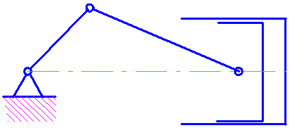 Zkrácený_klikový_mechanizmus.jpg